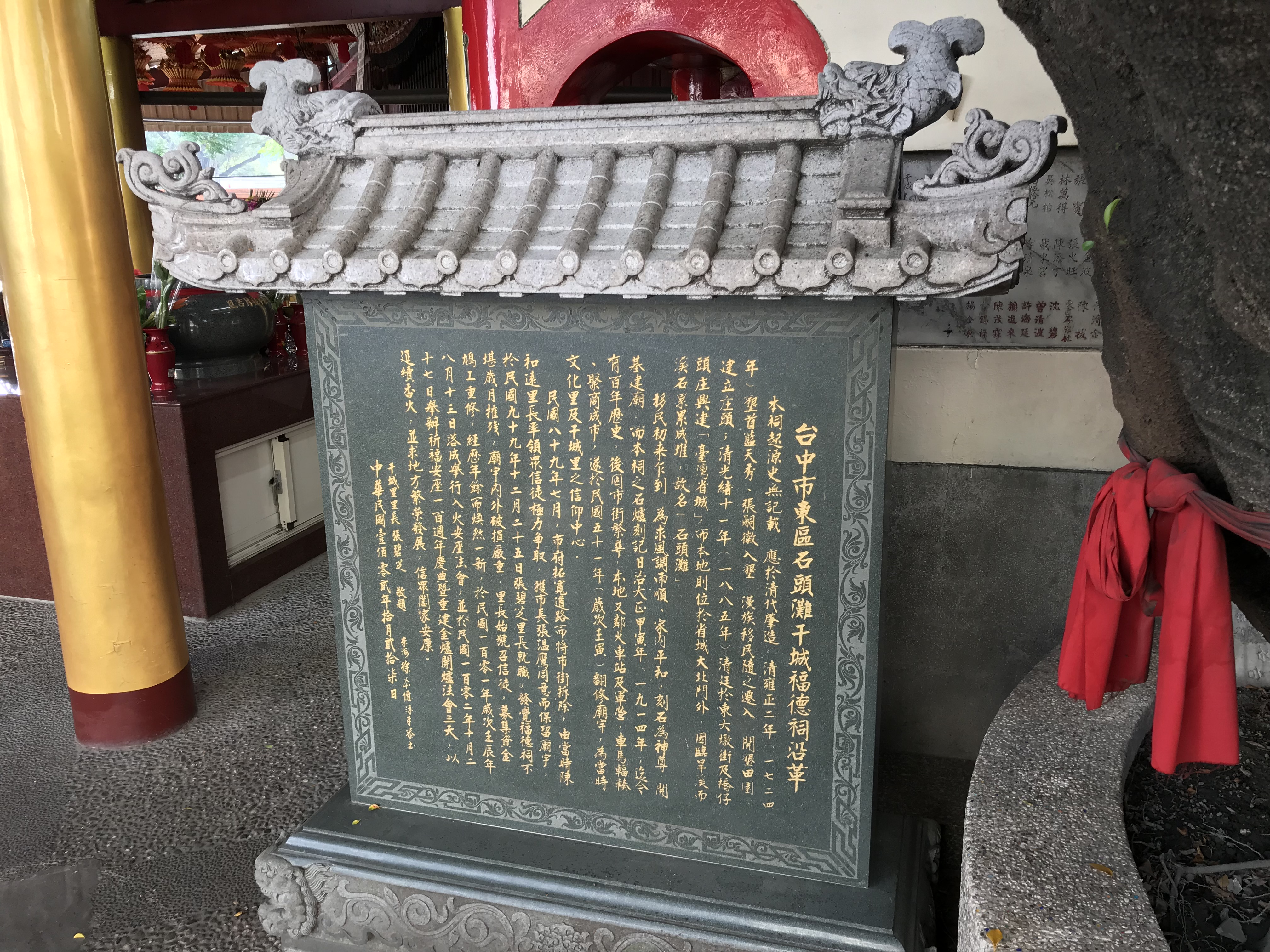 中文（台灣）: 石頭灘干城福德祠沿革